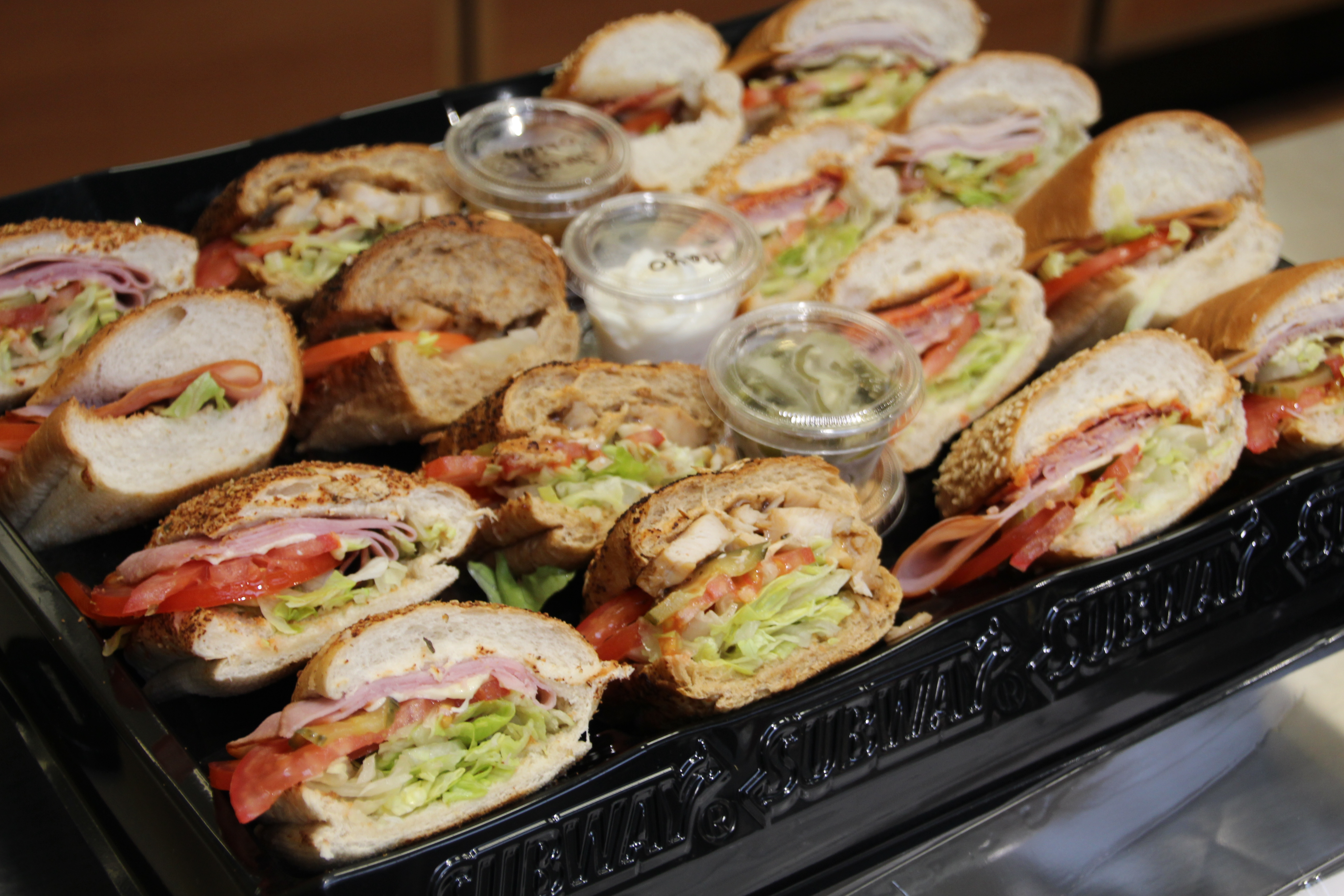 Sendvičový party platter SUBWAY®